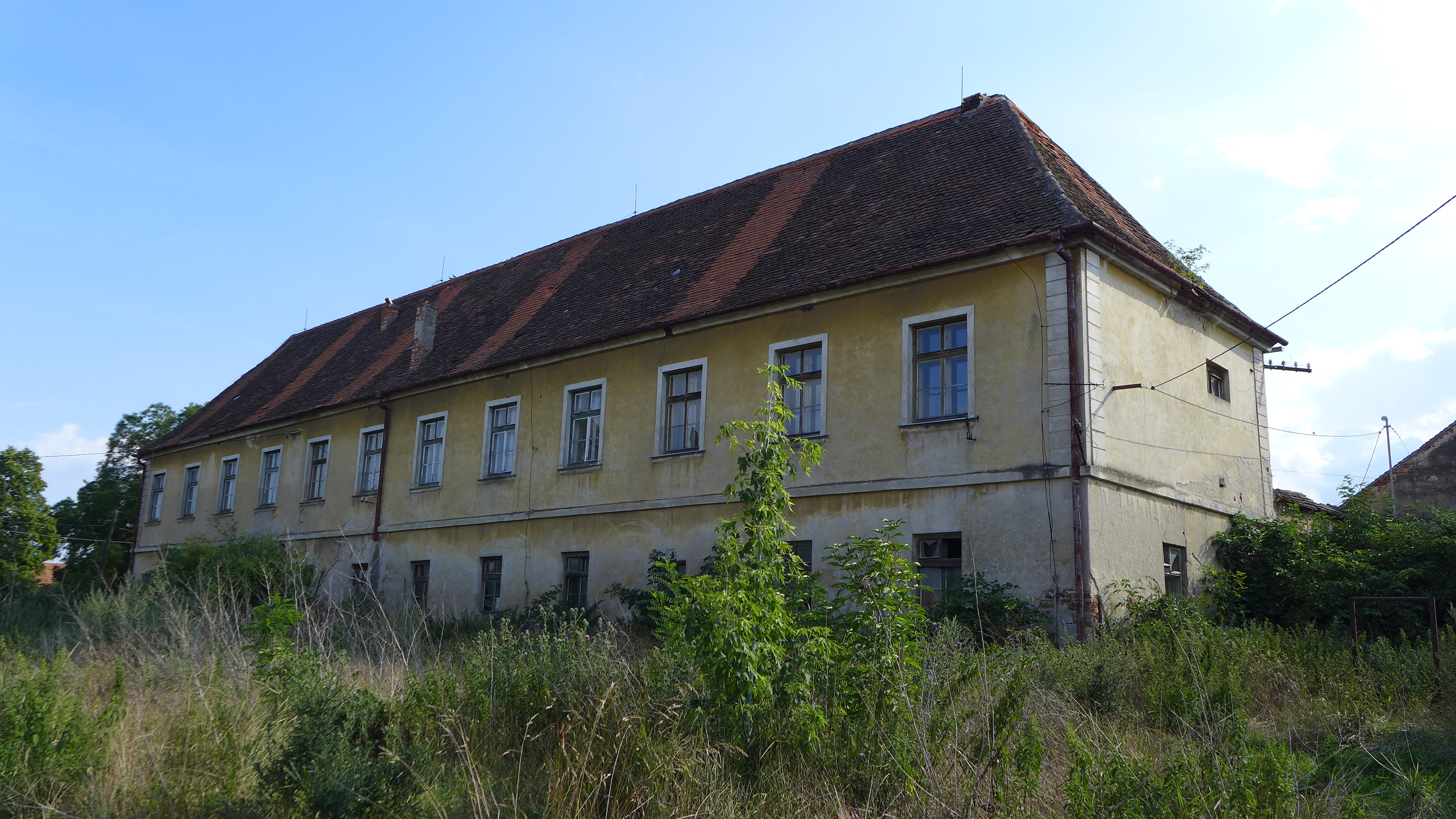 zámek (Branišovice), ve vsi 62, Branišovice, Branišovice.